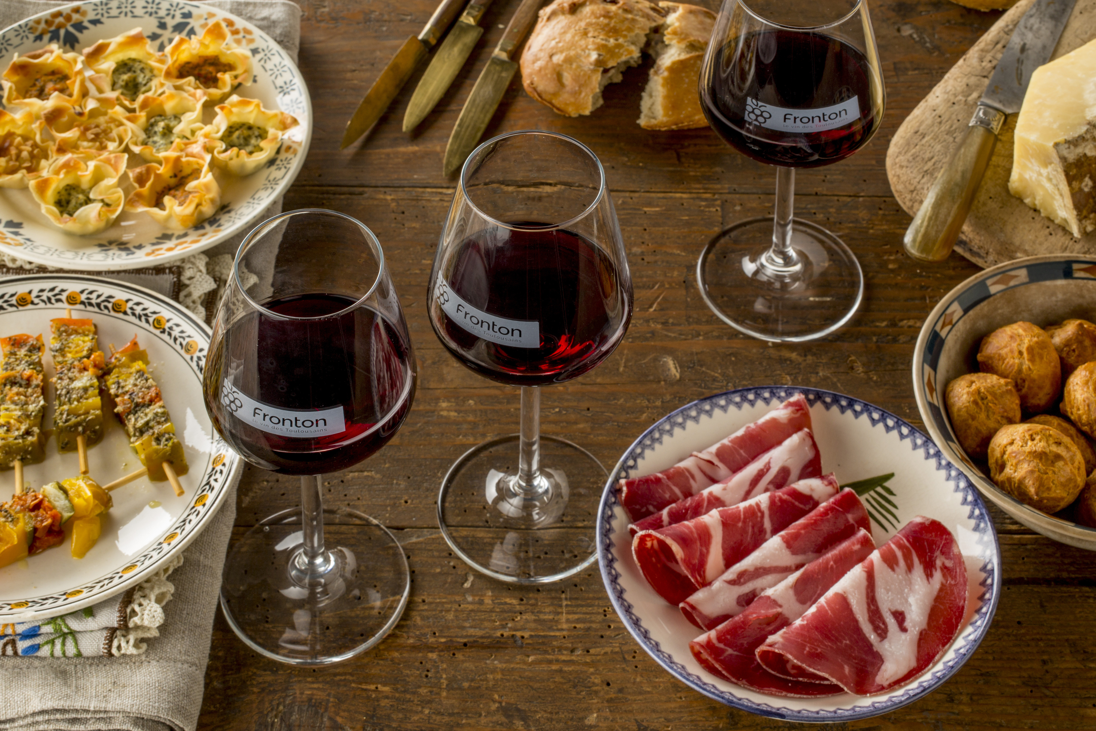 Verres d evin rouge AOC Fronton